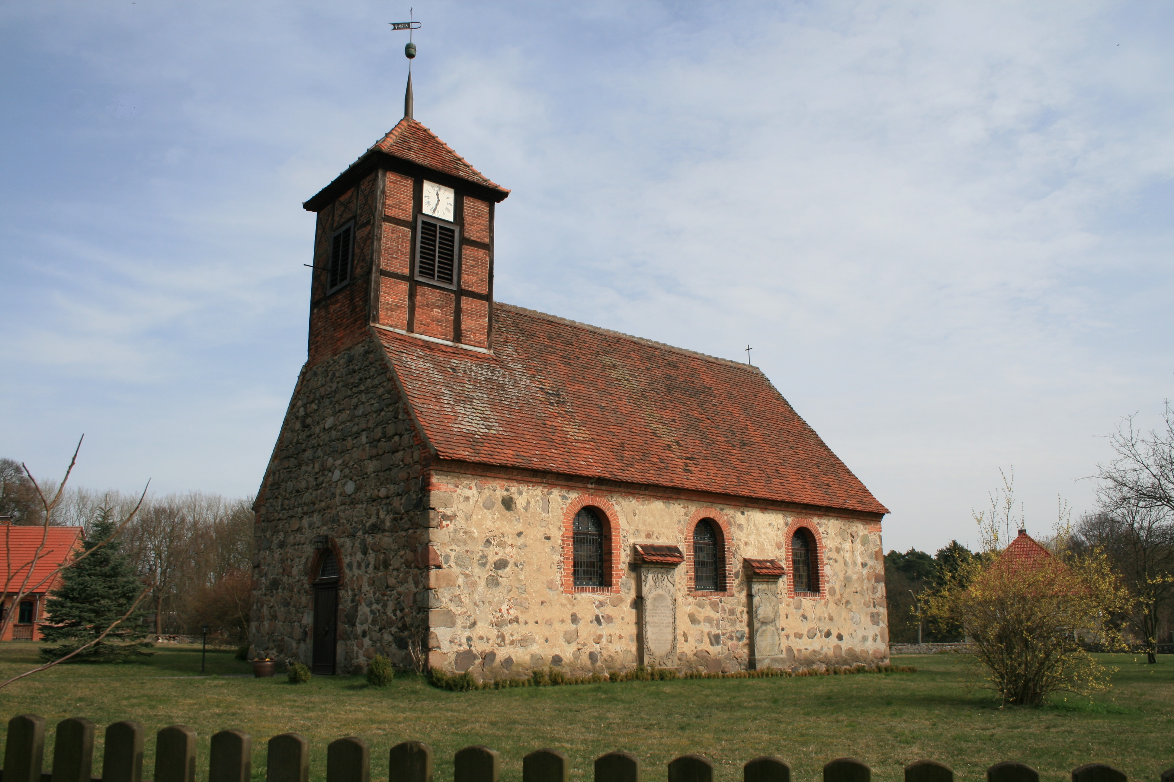 Dorfkirche von Südwesten